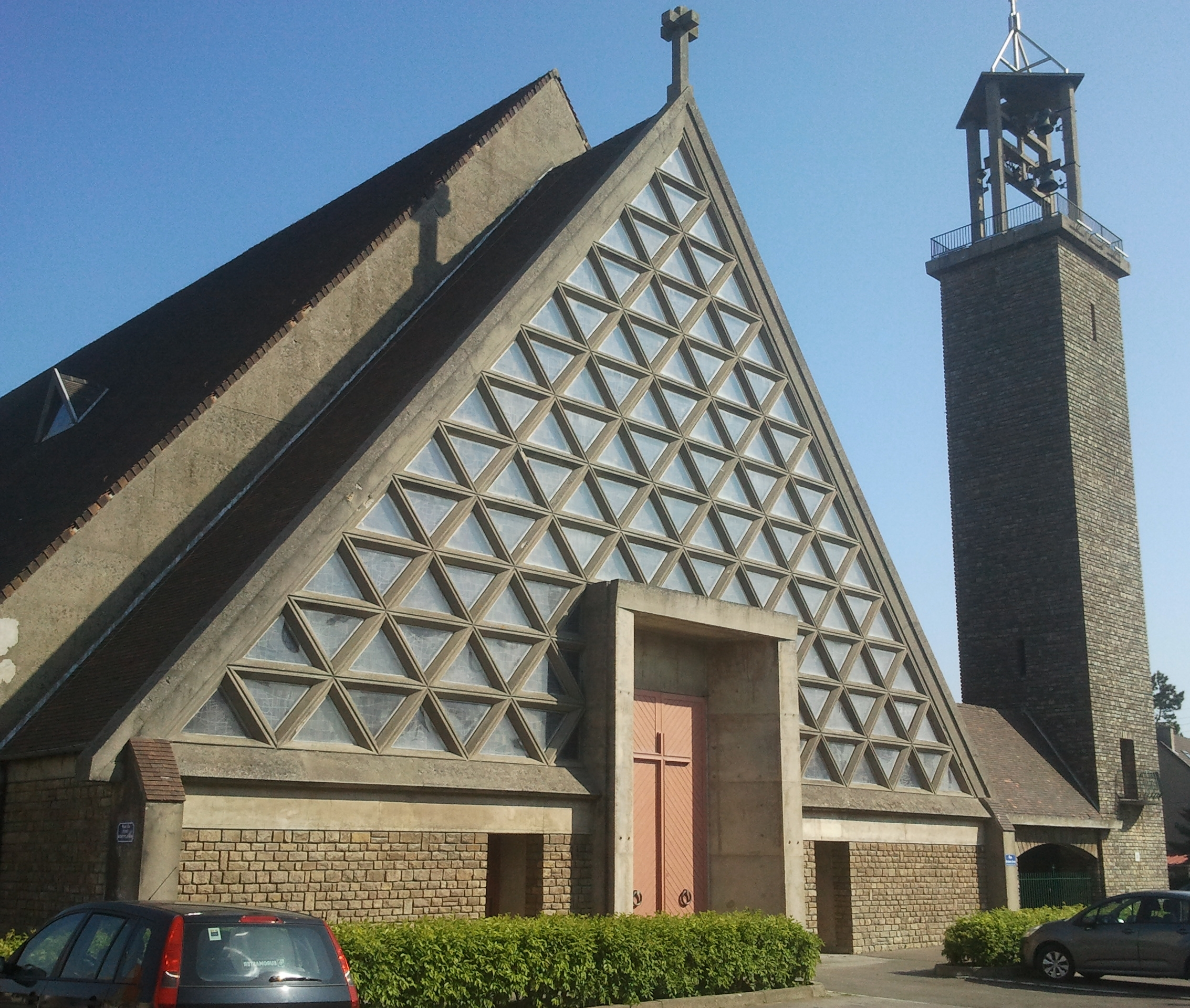 Église Saint-Vincent-de-Paul, vue de la place d'Estiennes-d'Orves, Boulogne-sur-Mer, France